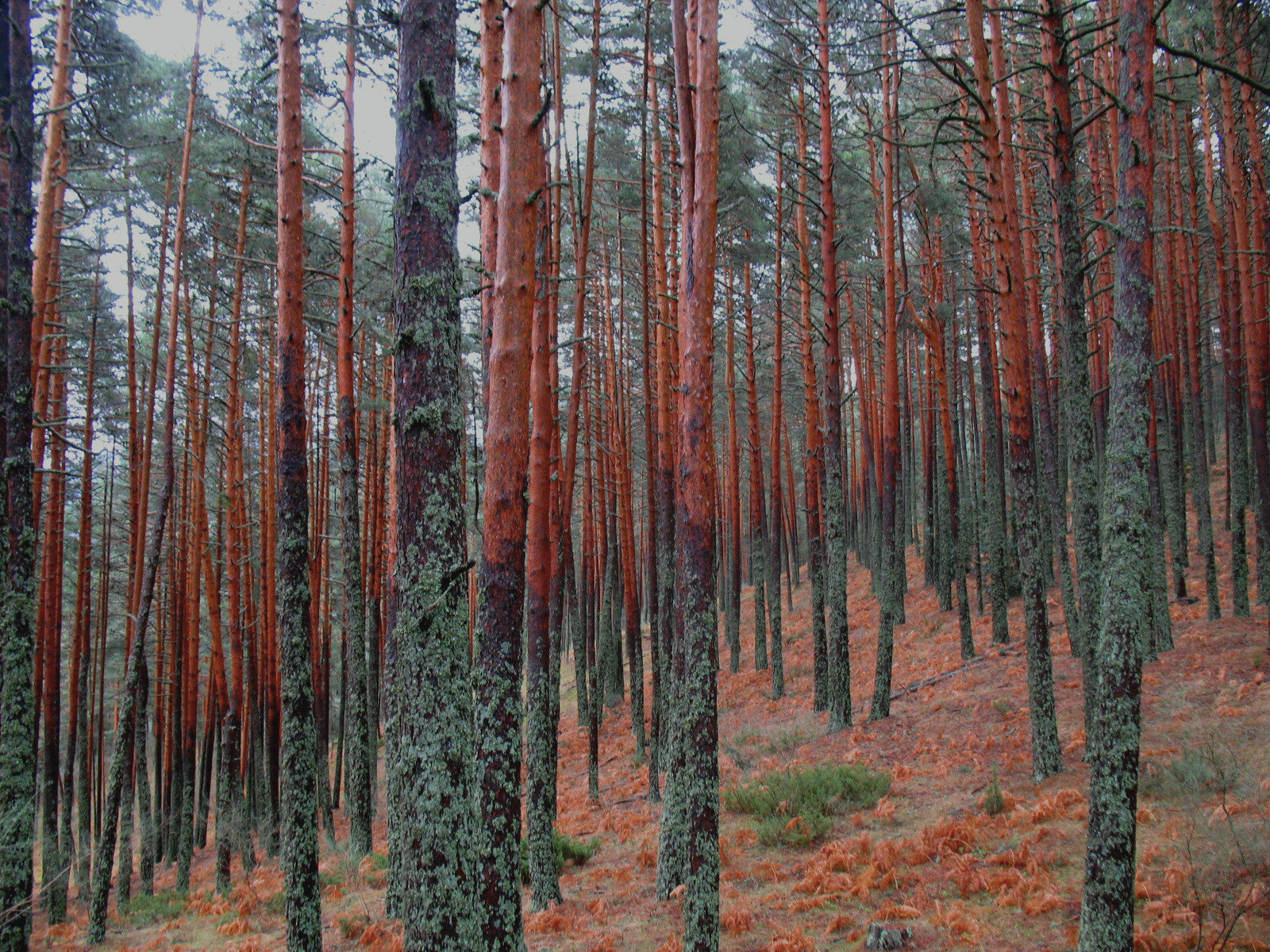 Pinares de pino silvestre en la vertiente segoviana de la Sierra de Guadarrama This is a photography of a Special Area of Conservation in Spain with the ID: ES4160109. Natura2000 entry, EEA entry